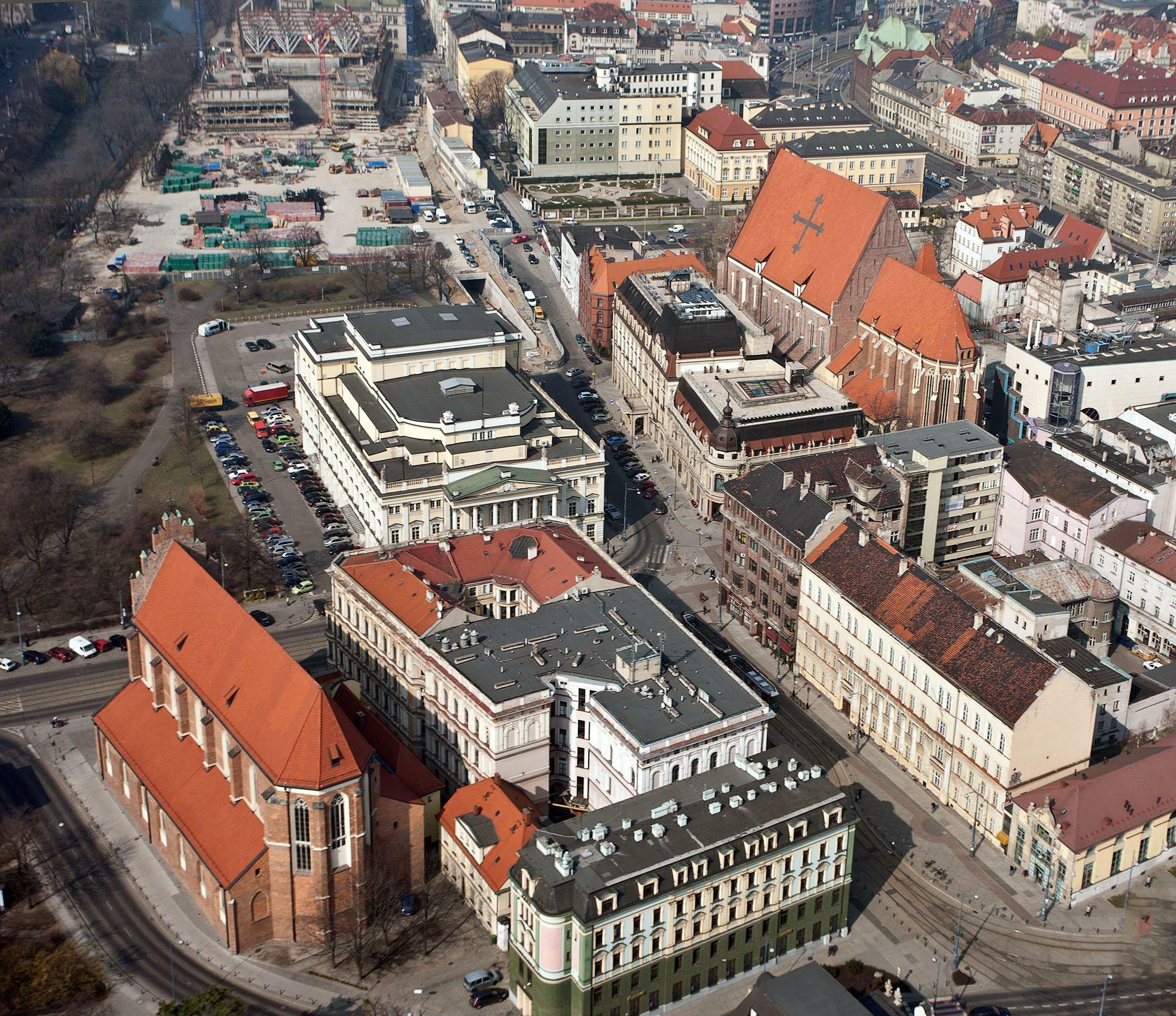 Na dole gotycki kościół Bożego Ciała, wyżej Opera Wrocławska i kolejna gotycka świątynia św. Doroty (z krzyżem na dachu) Patrząc dalej za operą, widać plac budowy i realizowany właśnie gmach Forum Muzyki.